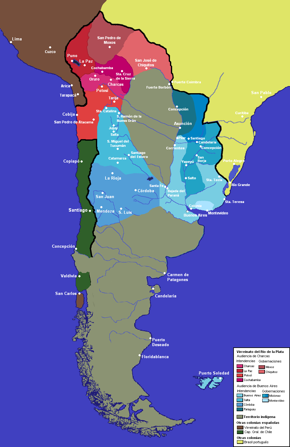 Mapa del Virreinato del Río de la Plata alrededor de 1783